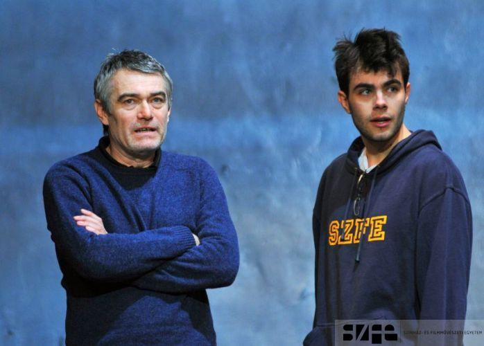 Terhes Sándor és Rada Bálint magyar színészek